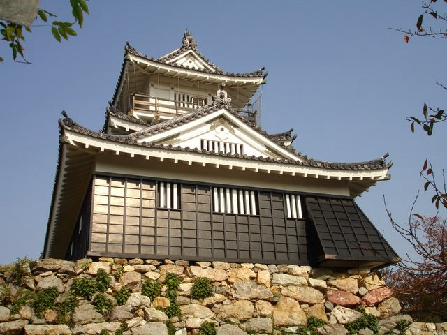 Hamamatsu Castle (浜松城)